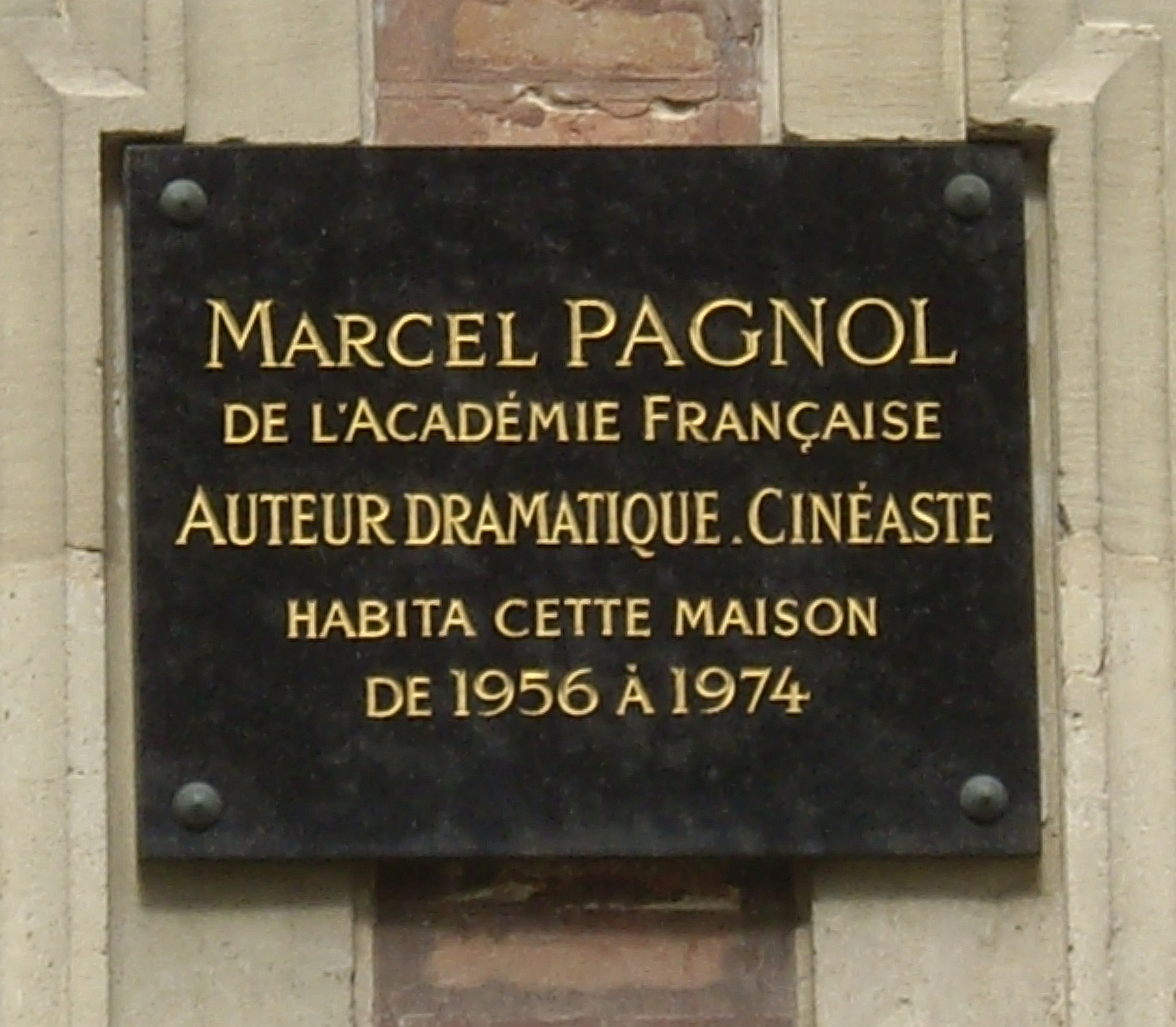 Plaque commémorative, 16 square de l'Avenue-Foch, Paris 16e. « Marcel Pagnol, de l'Académie française, auteur dramatique, cinéaste, habita cette maison de 1956 à 1974. »